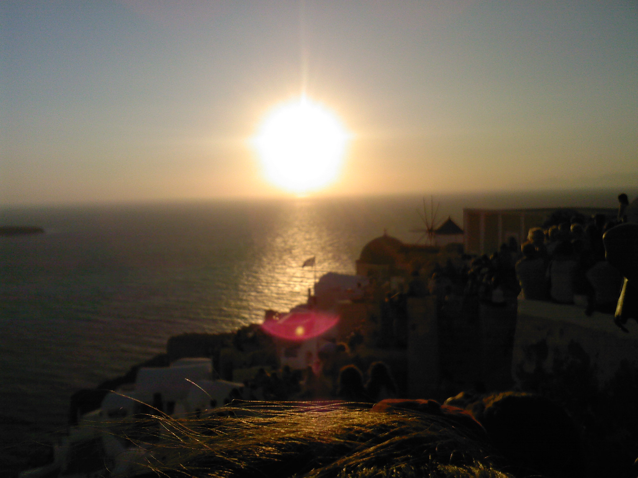 Tramonto a Oia (Nota: immagine sfocata, effetto lente, capelli nell'inquadratura)